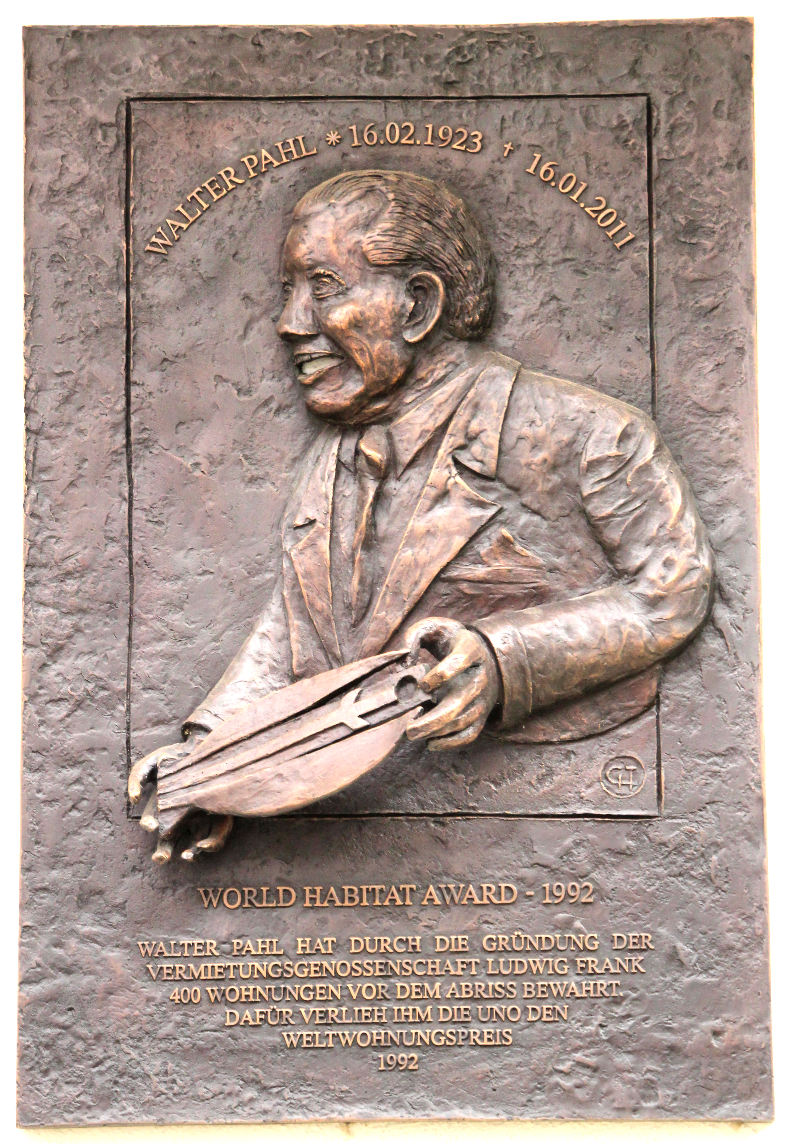 Bildinhalt: Tafel an einer Hauswand in der Melchiorstraße 10 zum Gedenken an den Genossenschafter Walter Pahl (1923-2011) Aufnahmeort: Mannheim, Deutschland